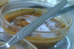 Balchão de camarão, um prato de Goa. Prawn Balchão, a dish from Goa.